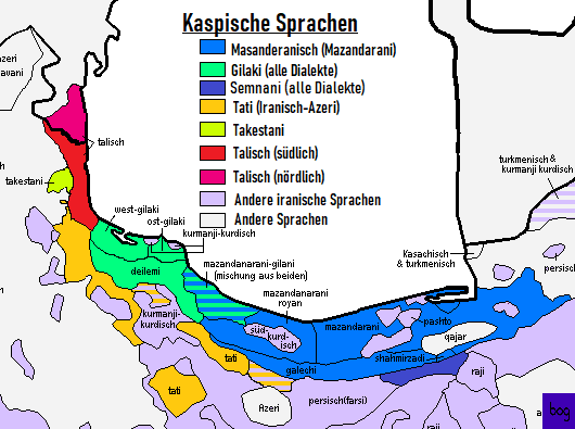 Kaspische Sprachen